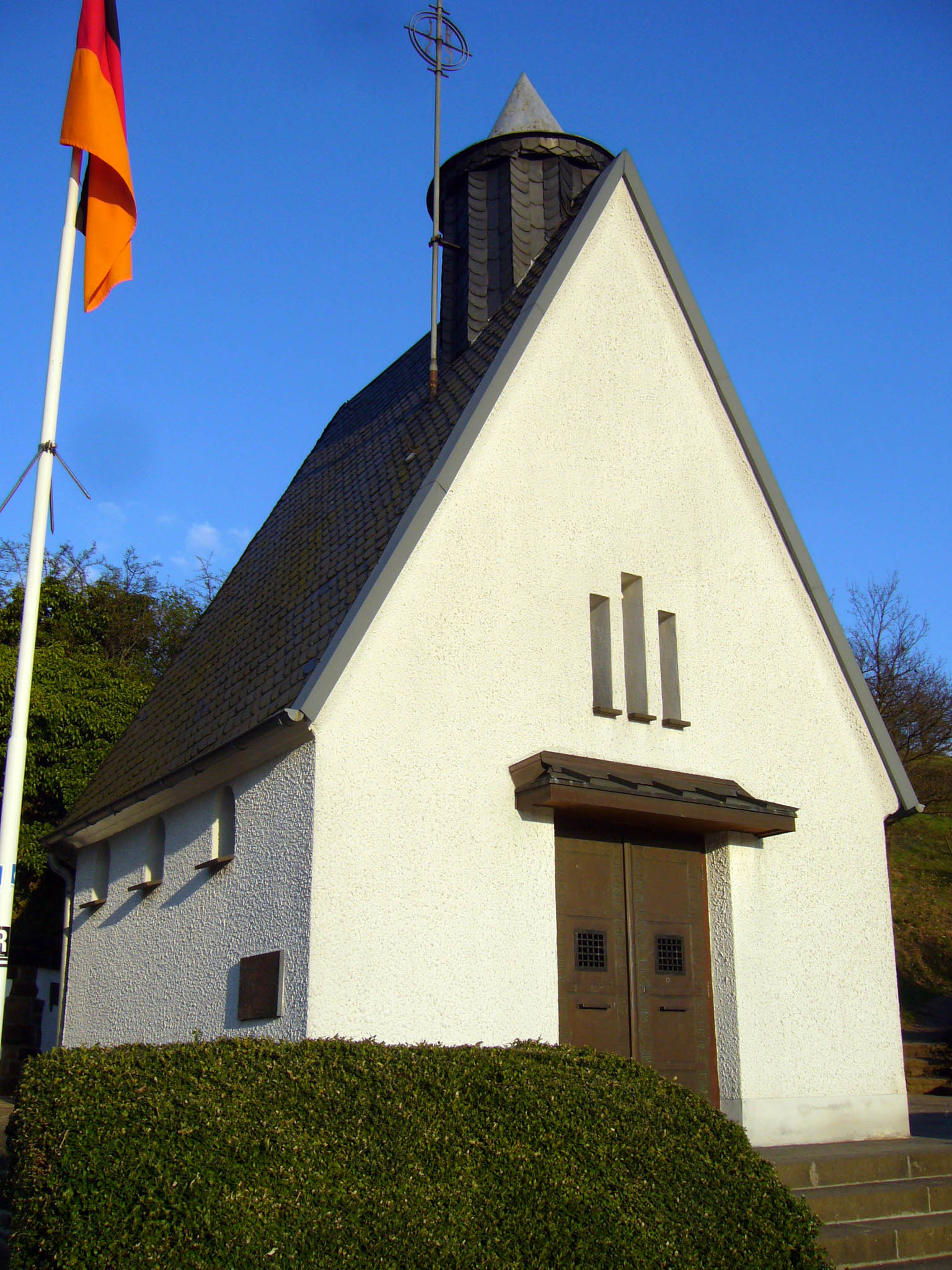 Ehrenmal des IR 29